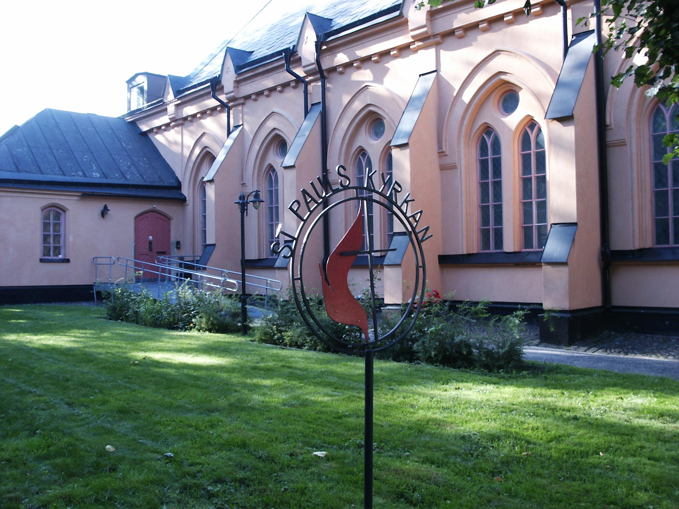 Sankt Paulskyrkan, metodistkyrka vid Mariatorget på Södermalm i Stockholm. 20050831